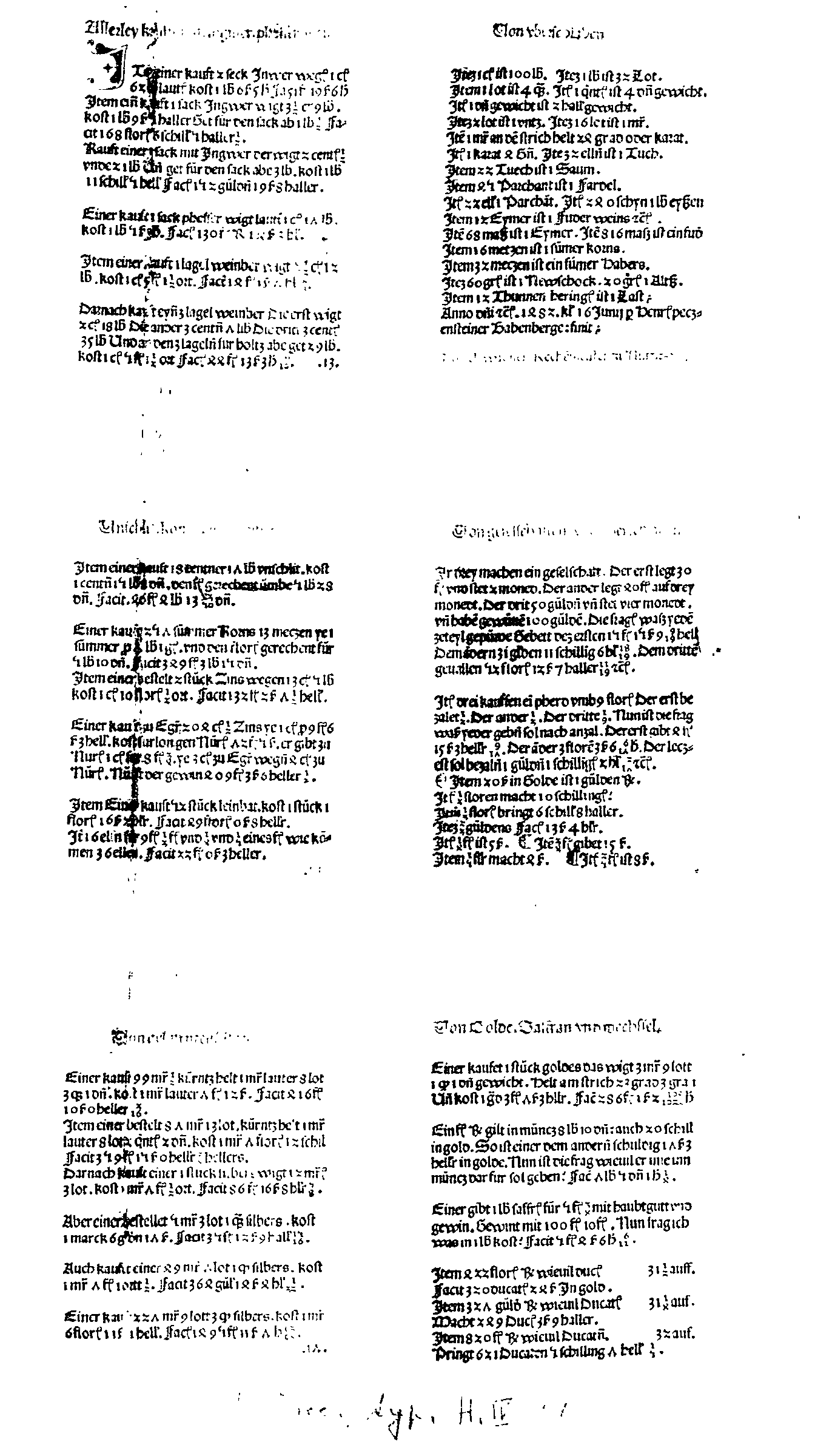 Teil des Bamberger Rechenbuchs Rechnung in aller Weis ... von Ulrich Wagner, Petzensteiner, Bamberg 1483